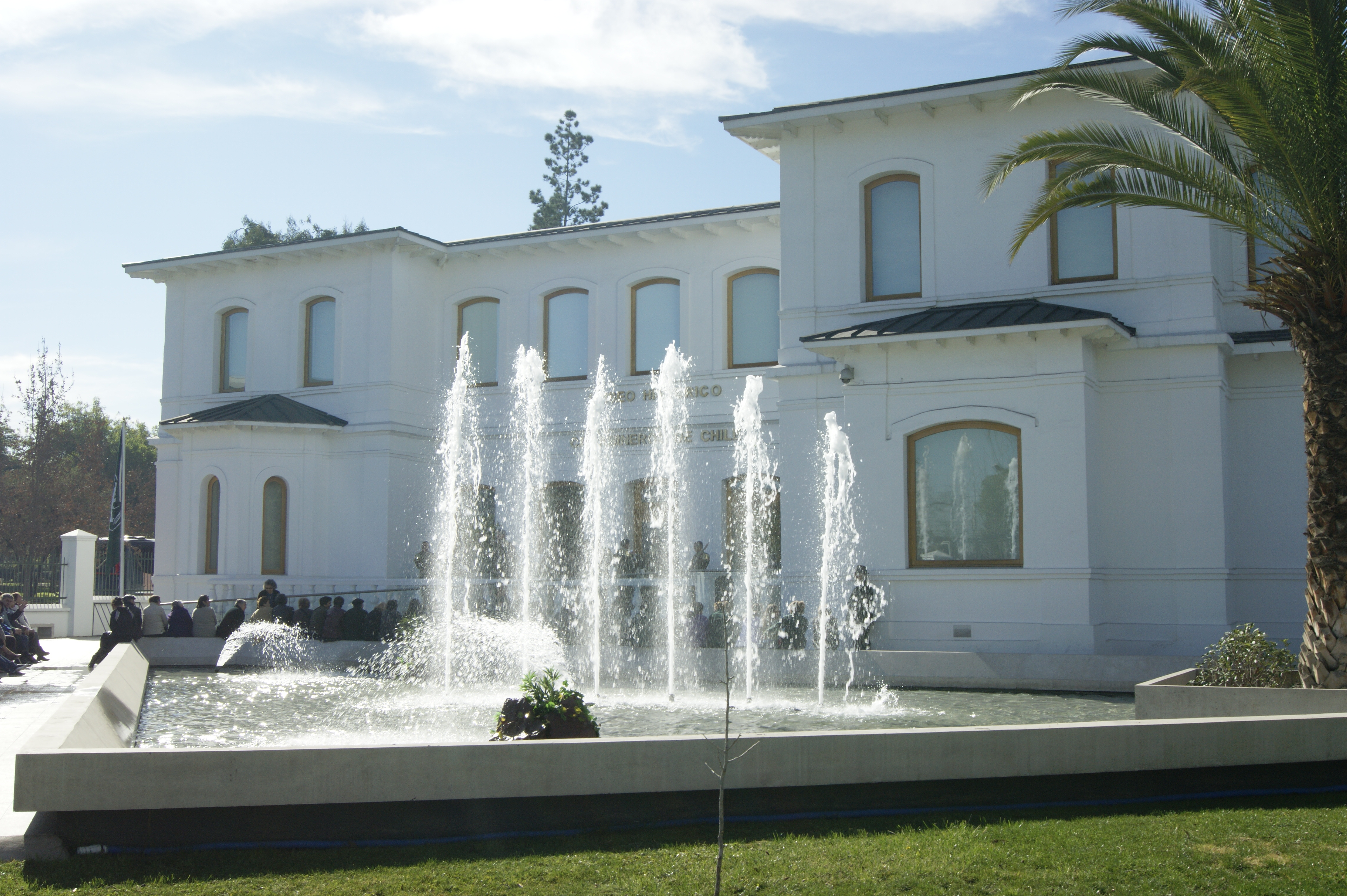 Frontis del Museo Histórico Carabineros de Chile, antigua Dirección de la Escuela de Carabineros.